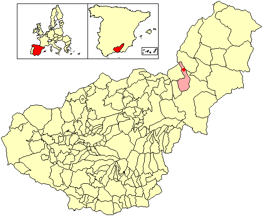 Situación de la localidad de Carramaiza (en el municipio de Zújar) respecto a la provincia de Granada, en España.